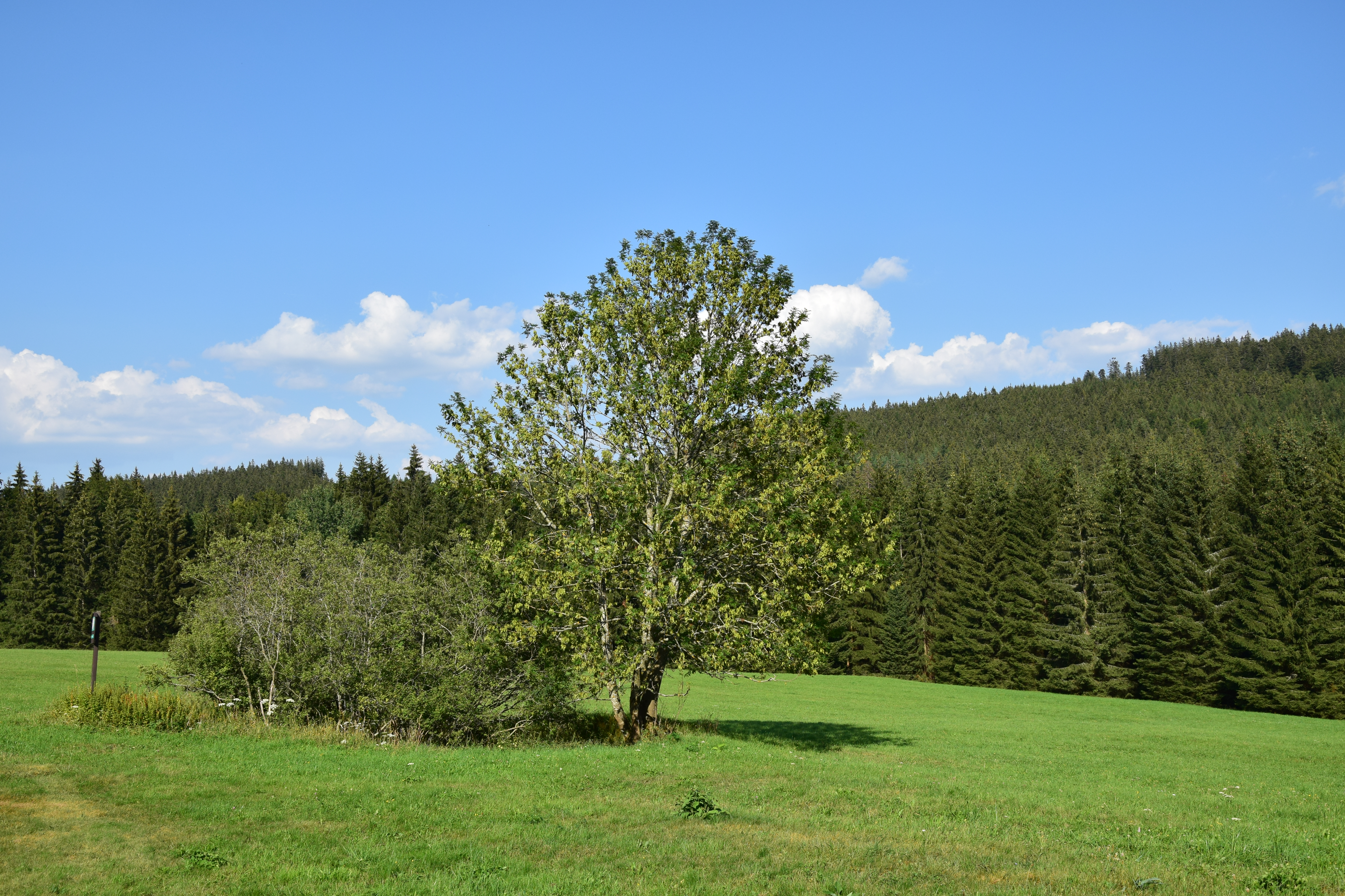 Páteříkova Huť – severní část chráněného území